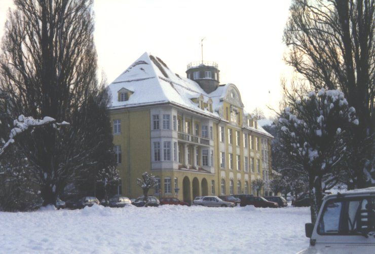 grammar school in Deggendorf, Germany